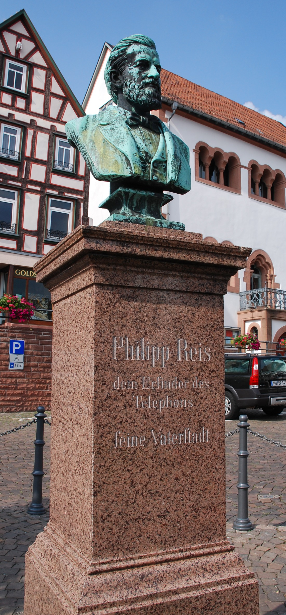 Philipp Reis Denkmal am Untermarkt in Gelnhausen